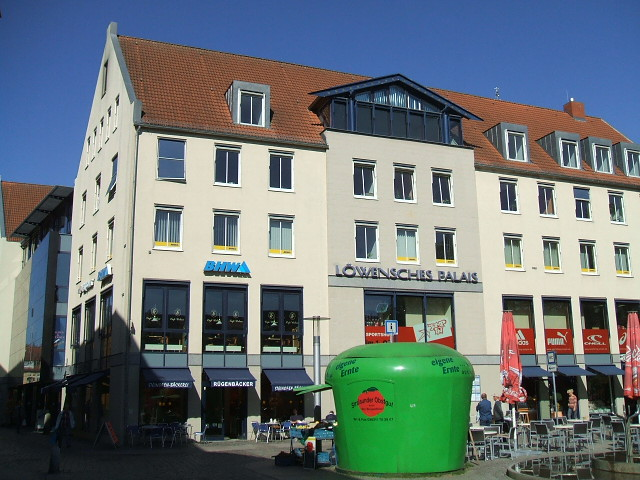 Stralsund.